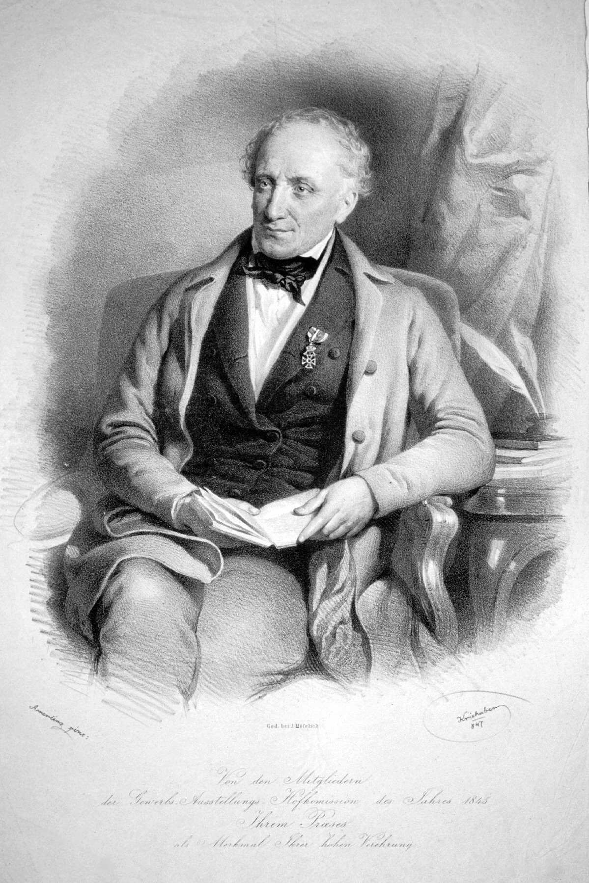 Andreas Freiherr von Baumgartner (1793-1865), Naturforscher, Staatsmann.